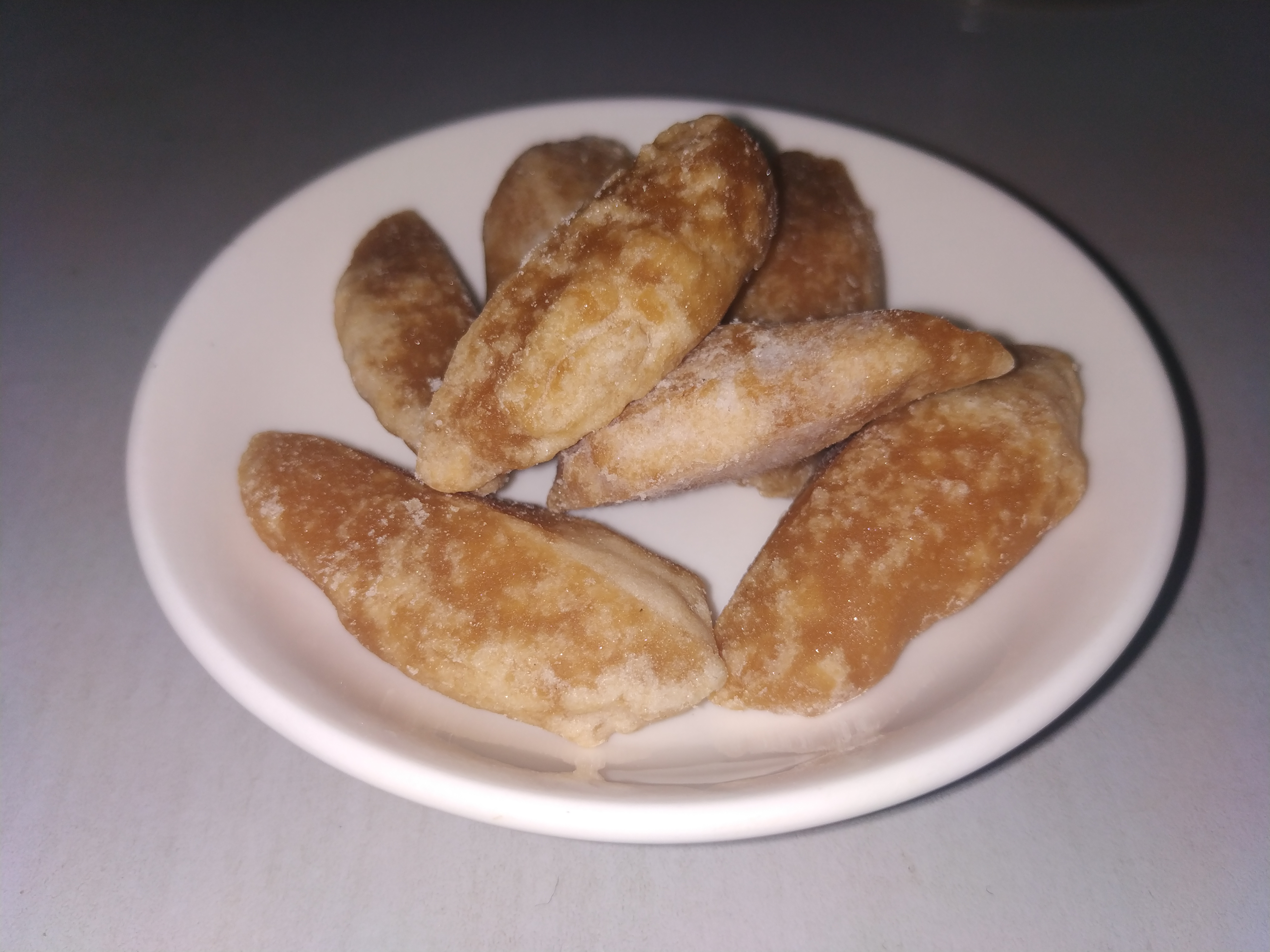 ရိုးရိုးထန်းလျက်ခဲများ